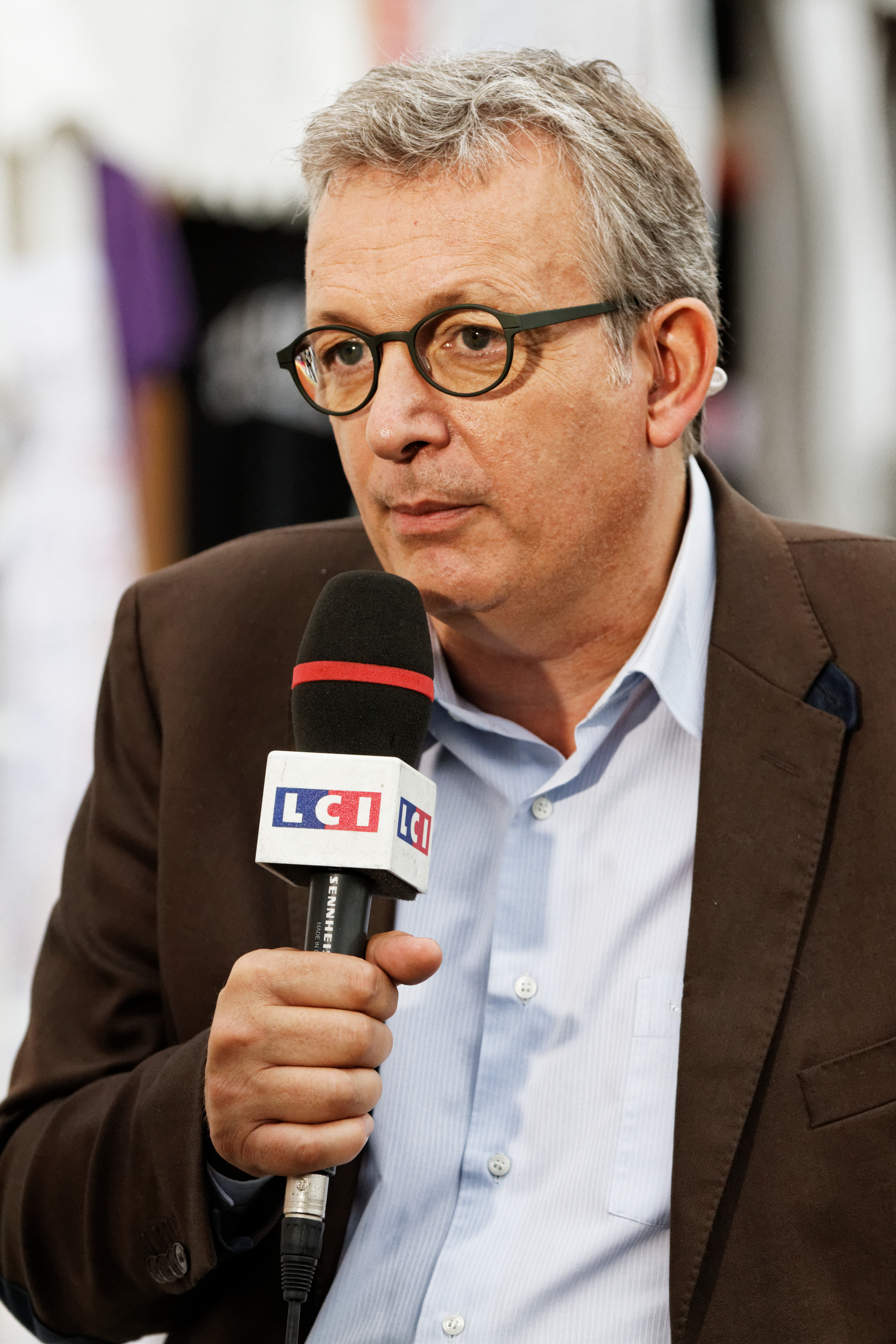 Pierre Laurent interviewé par les journalistes de LCI lors de la Fête de l'Humanité 2013.